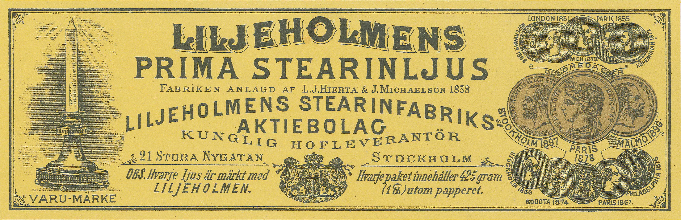 Liljeholmens stearinfabrik på Södermalm, etikett